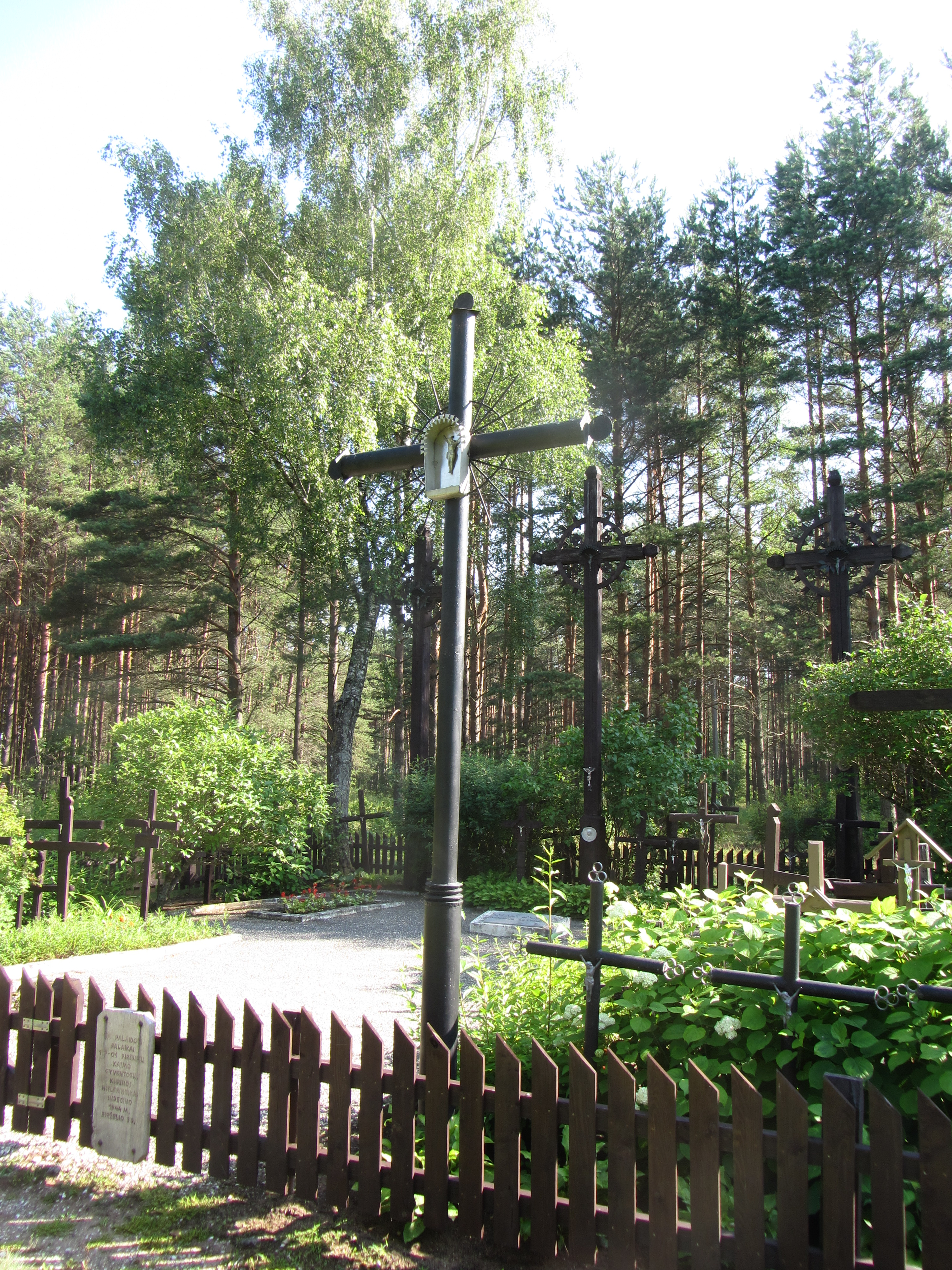 Pirčiupiai 65446, Lithuania